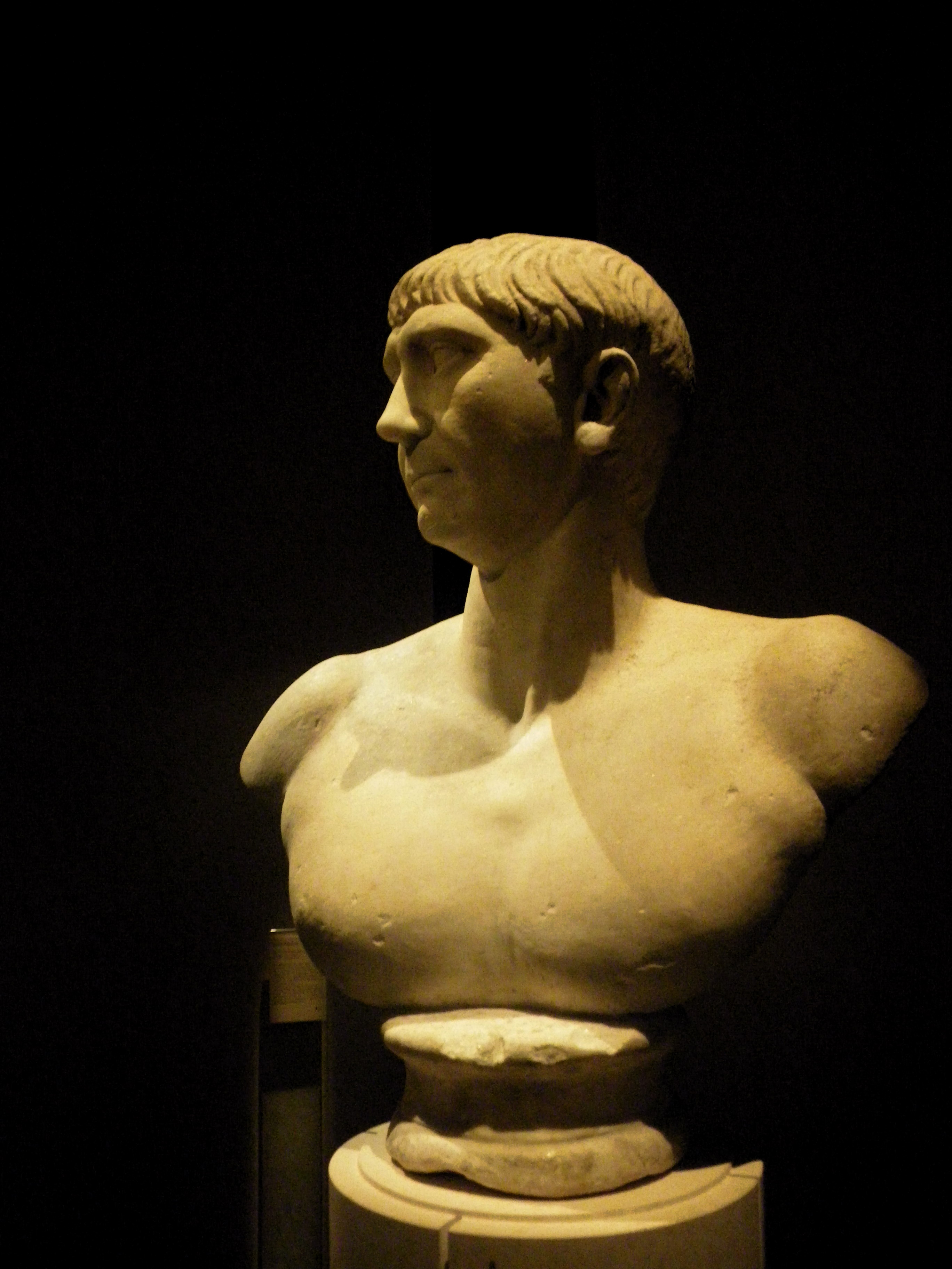 Bustul Imparatului Traian